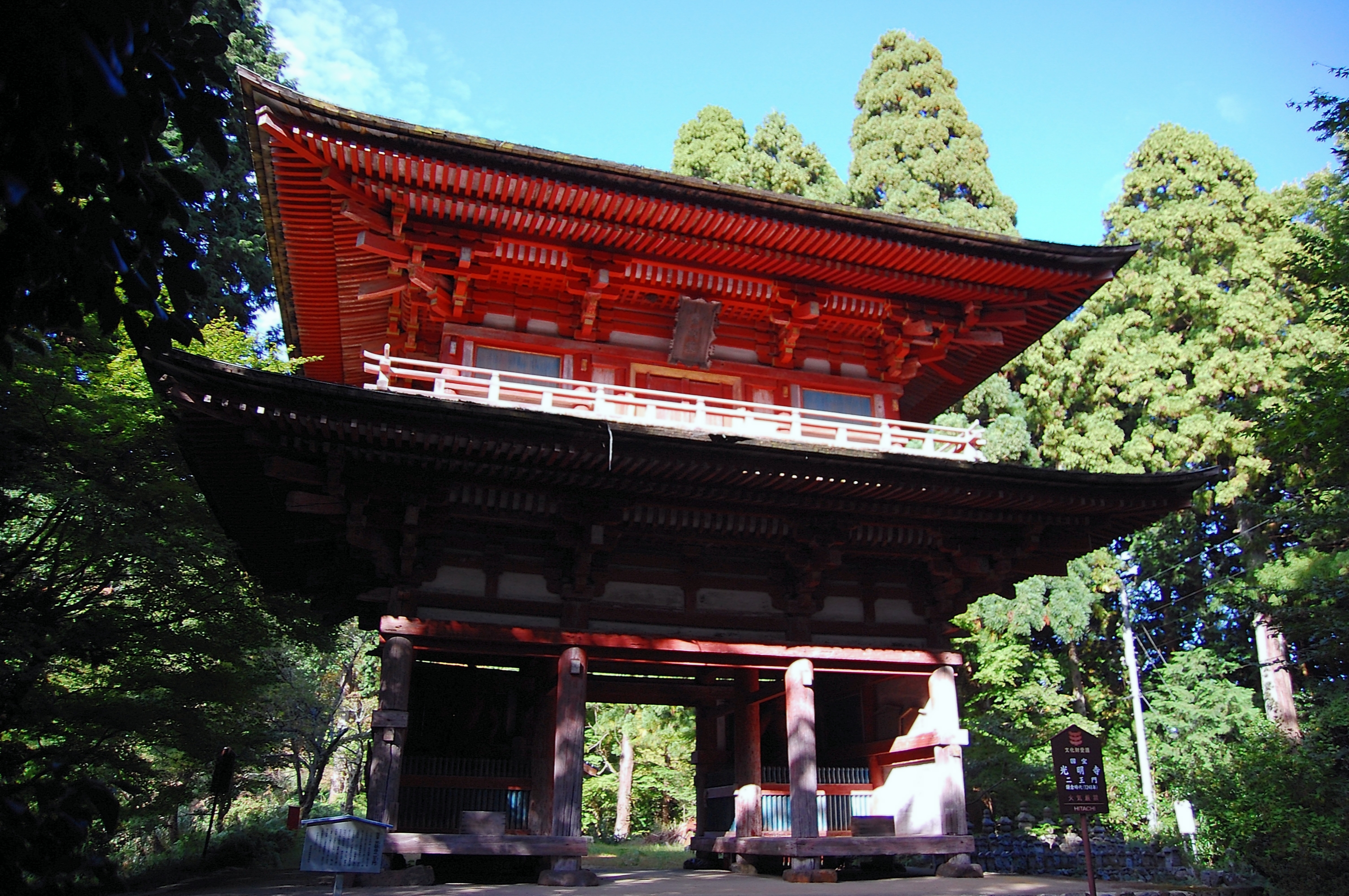 君尾山光明寺 (綾部市)二王門（日本の国宝）